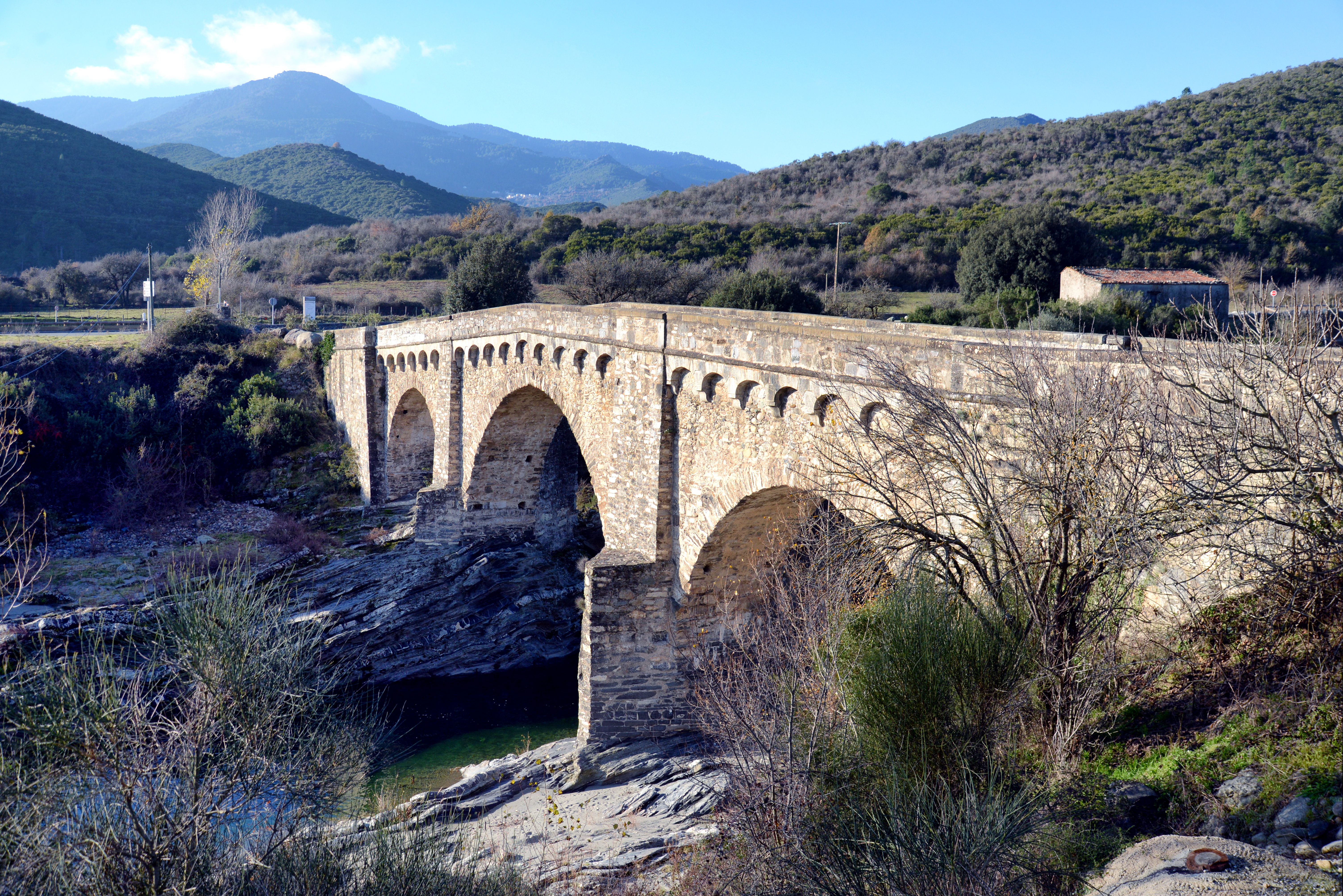 Altiani, Rogna (Corse) - Pont'à u large appelé communément pont d'Altiani